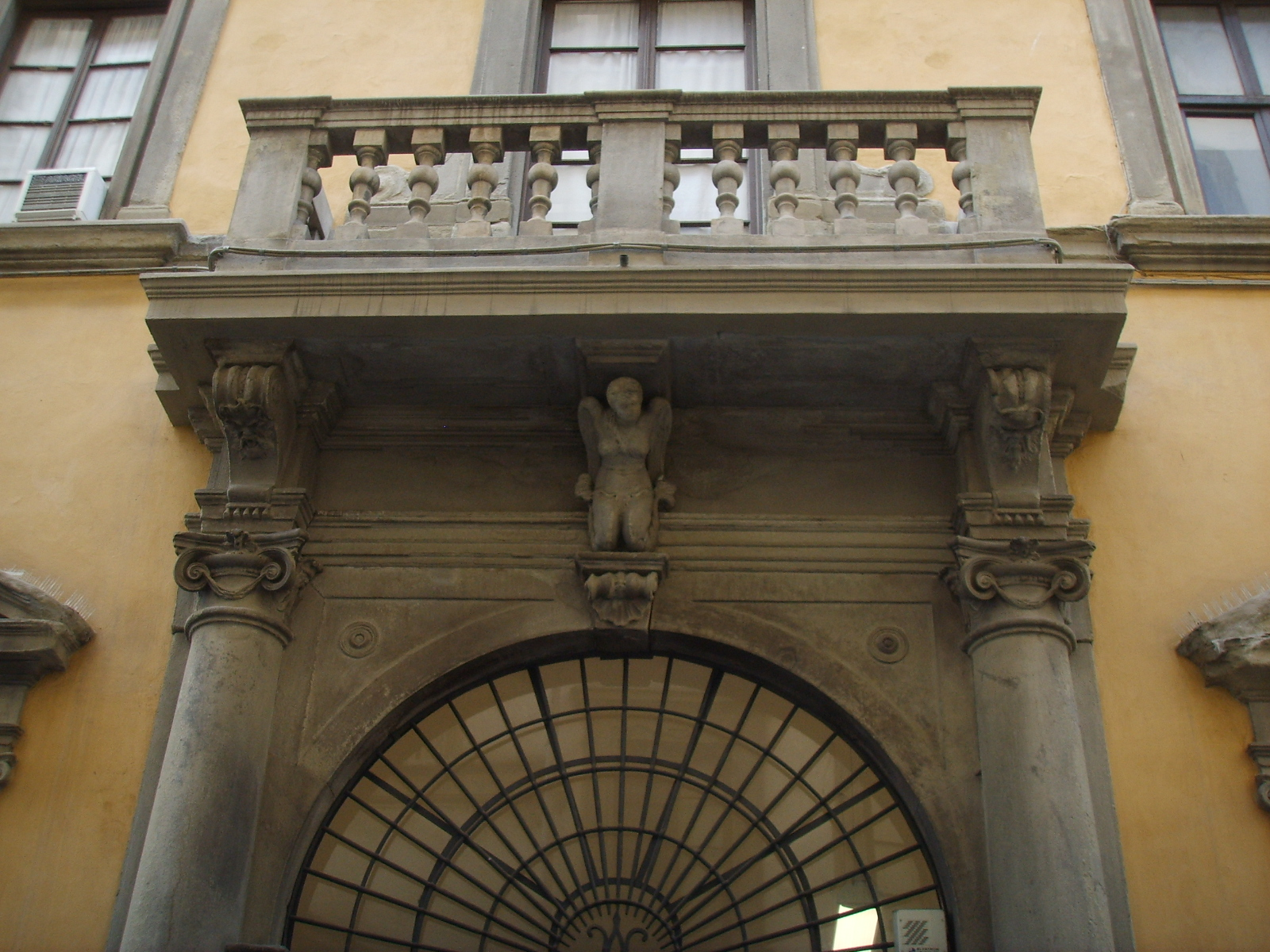 Via santo spirito, palazzo